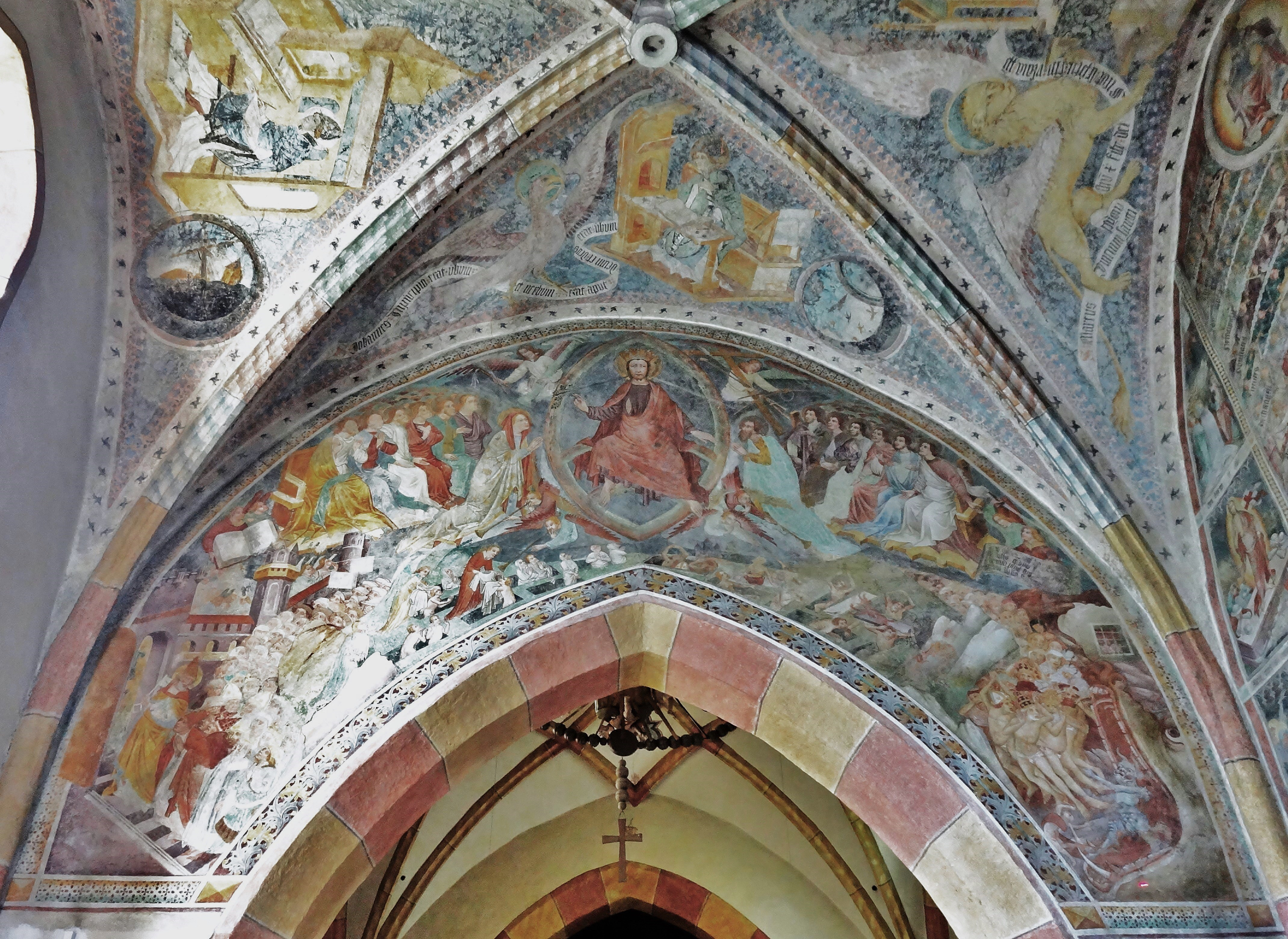 Kath. Pfarrkirche Hl. Andreas Thörl-Maglern, das Jüngste Gericht, Fresko chorseitig am Triumpfbogen